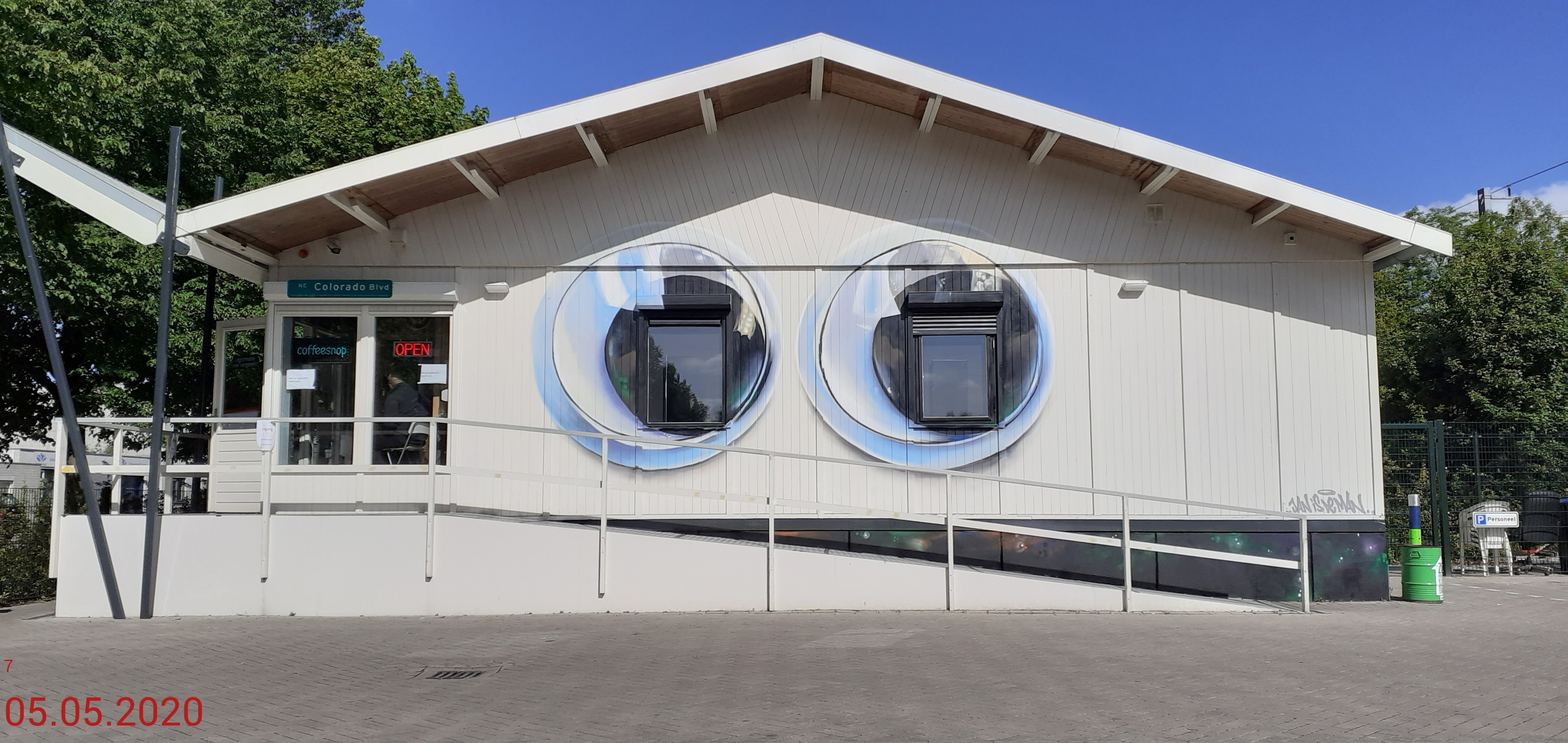 Een coffeeshop in Utrecht